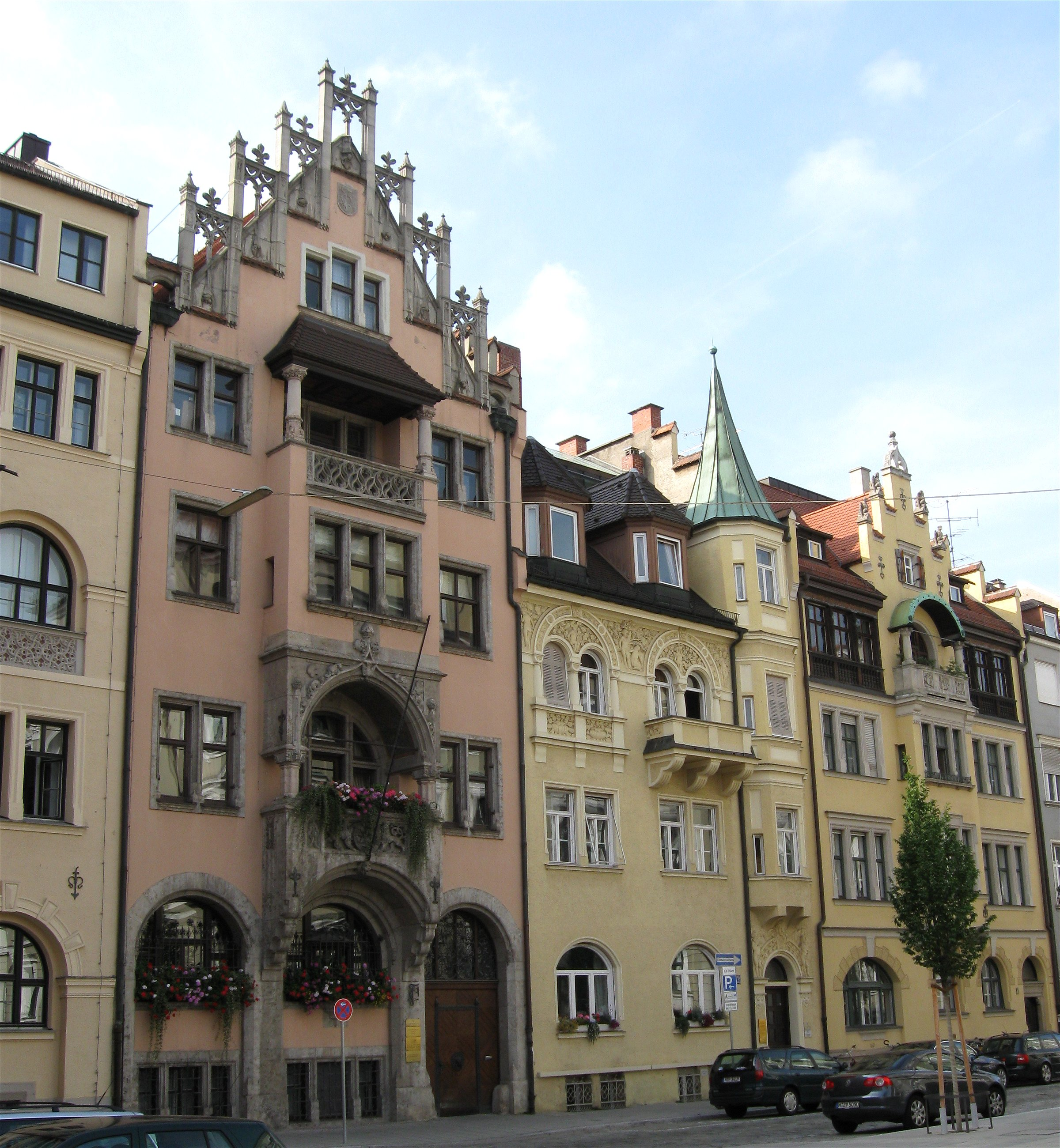 Richard-Wagner-Straße, München